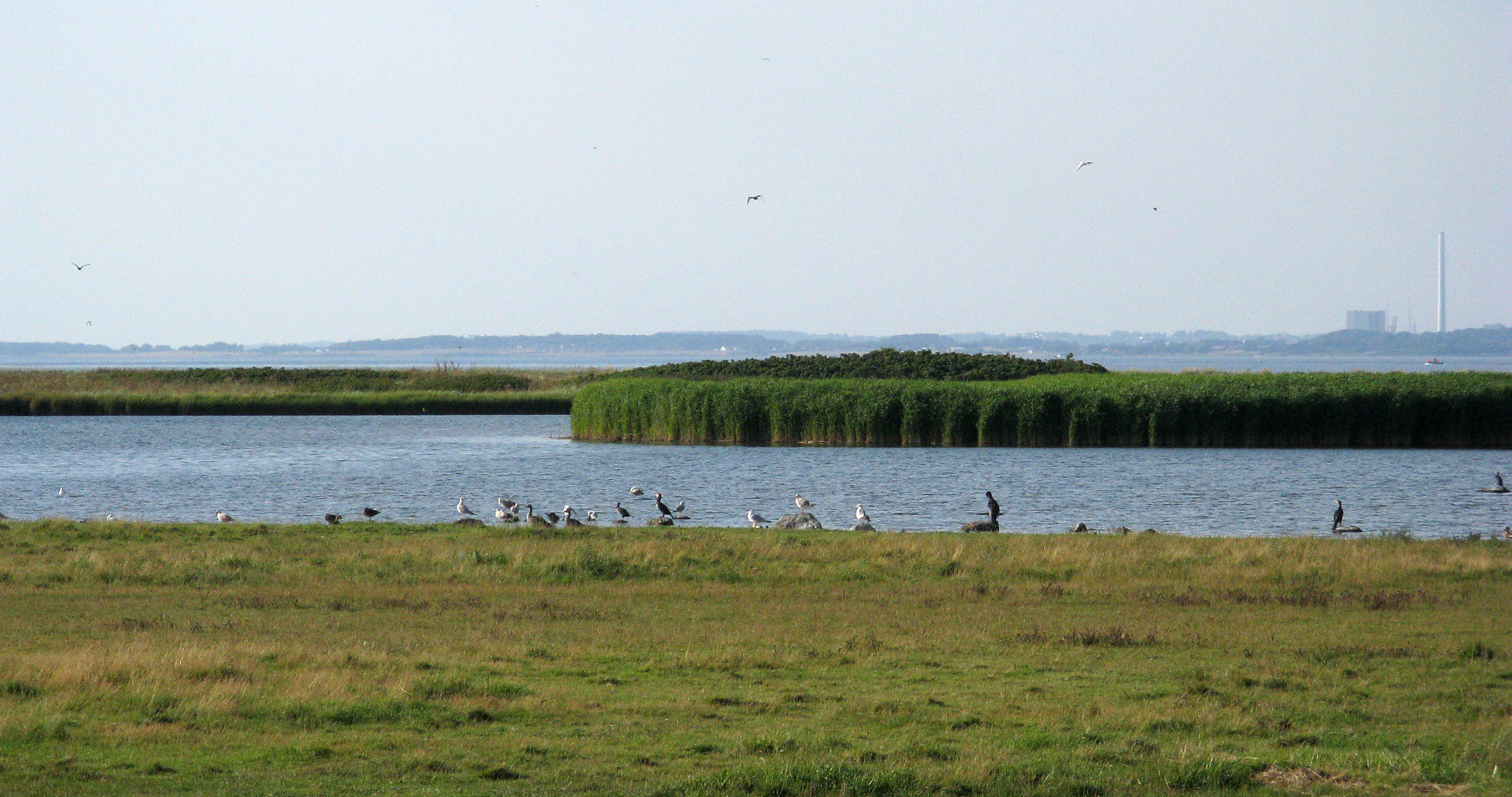 Naturområdet Flasken er en brakvandssø og et fredet naturområde i Kirke Helsinge Sogn, Kalundborg Kommune, beliggende ved Halleby Å's udløb til Storebælt.